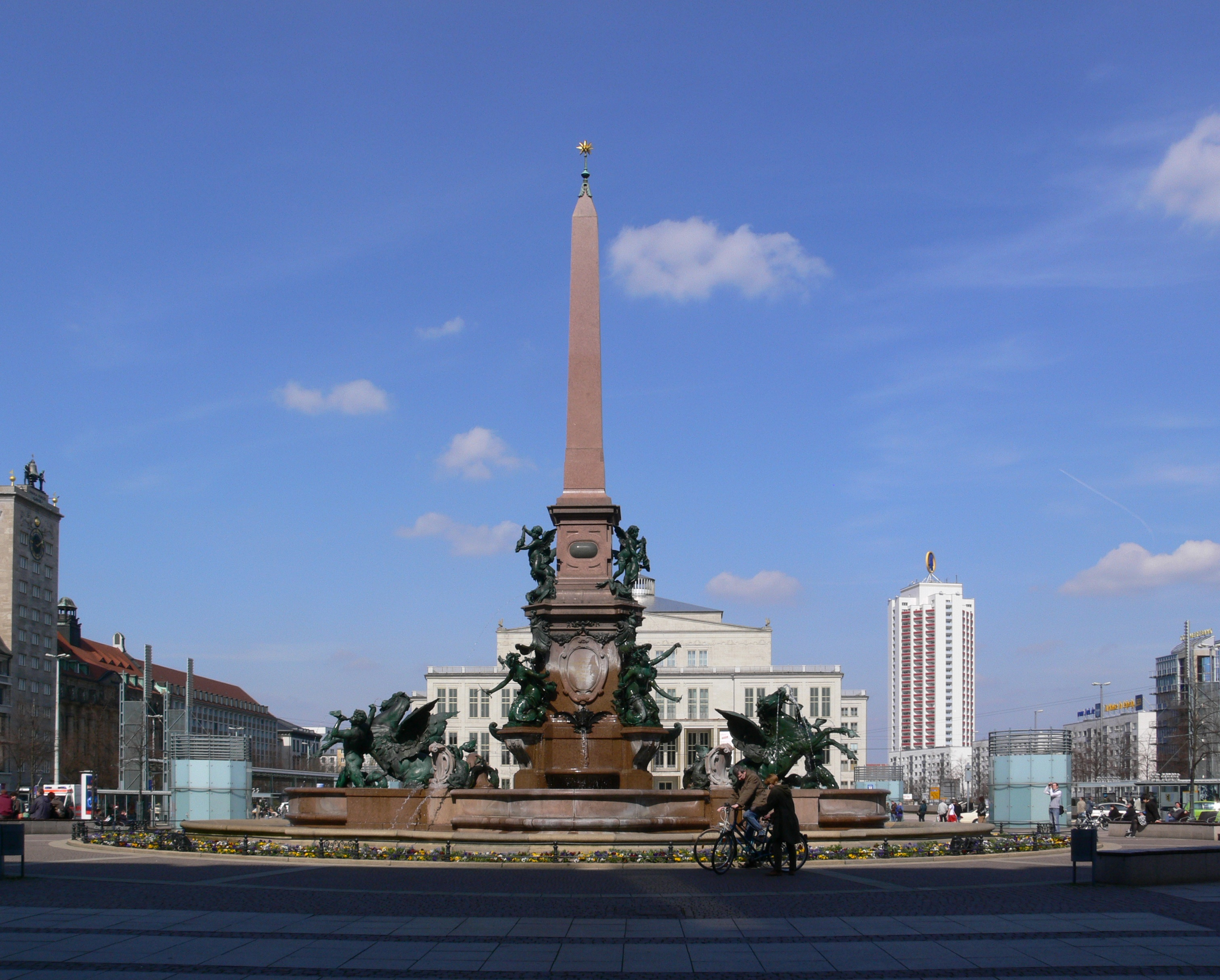 Leipzig, Mendebrunnen am Augustusplatz